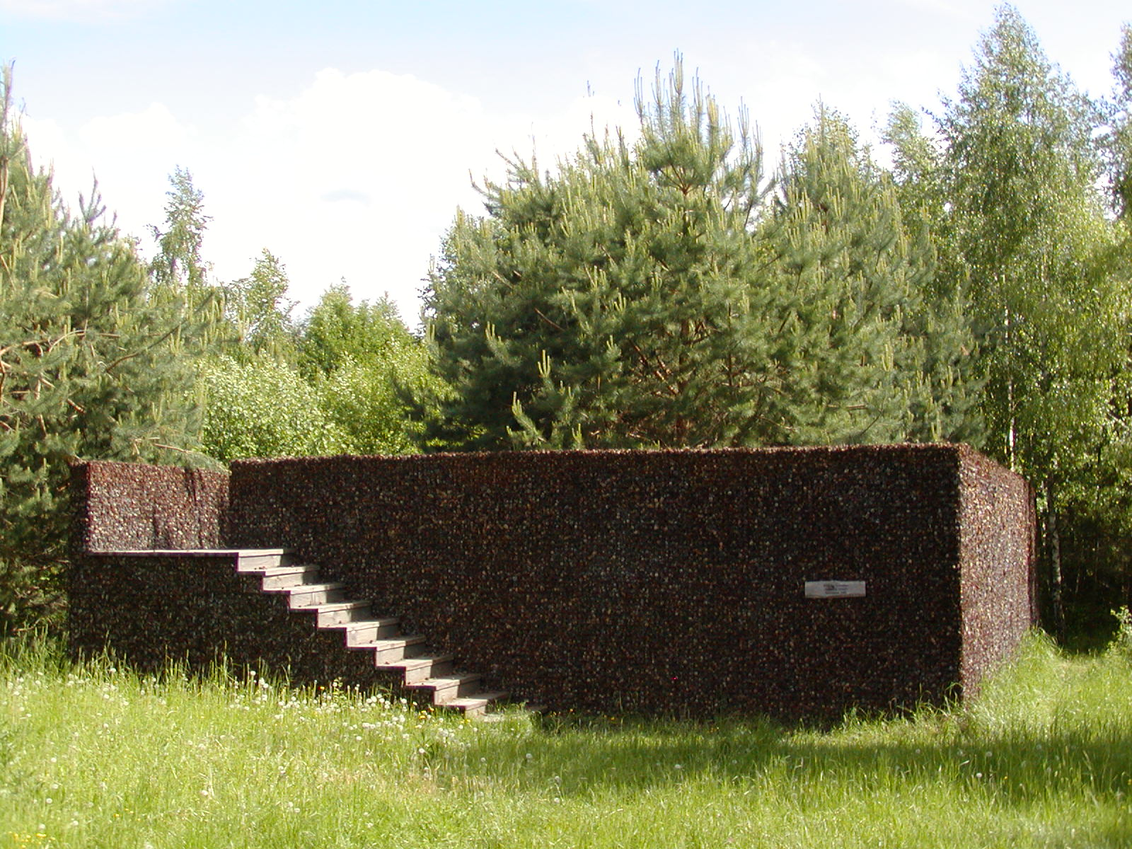 Павильон шишек Адриана Гейзе в Никола-Ленивце